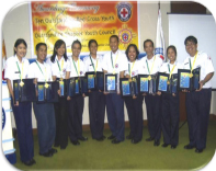 TORCY 2006 Awardees